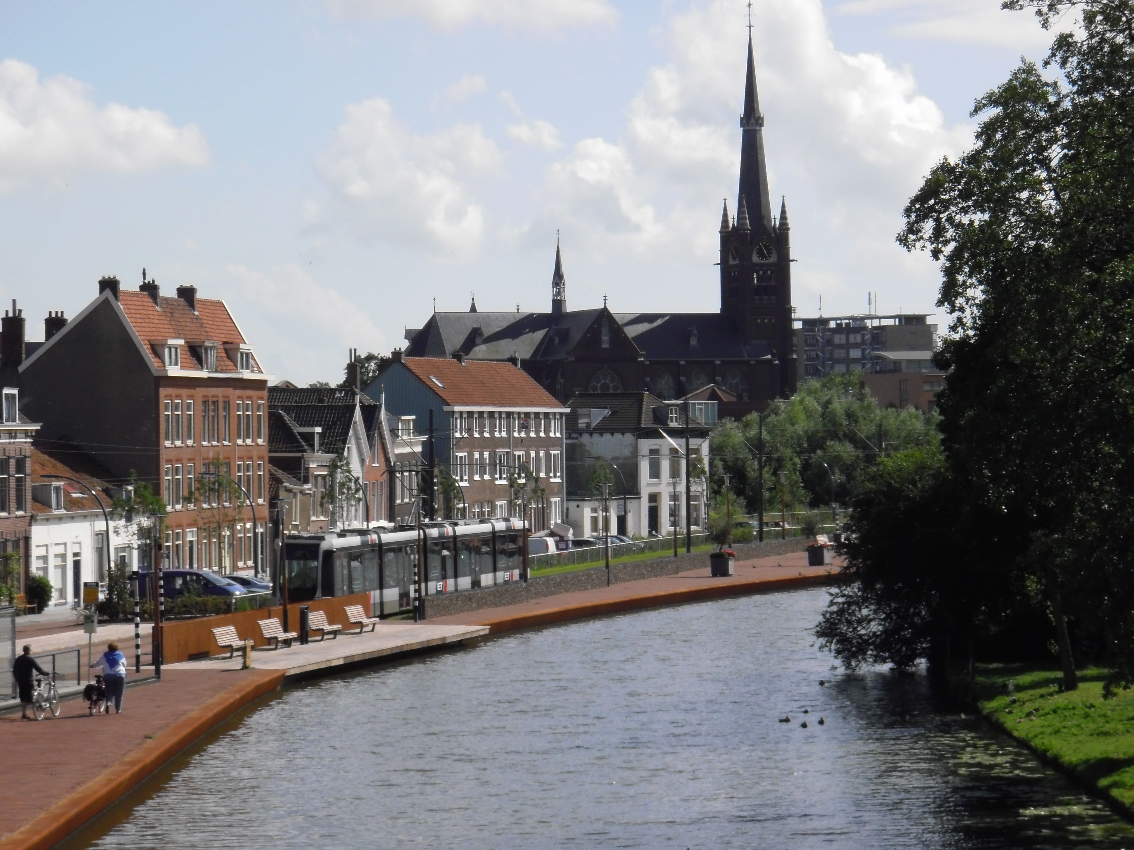 Schiedam - 2009